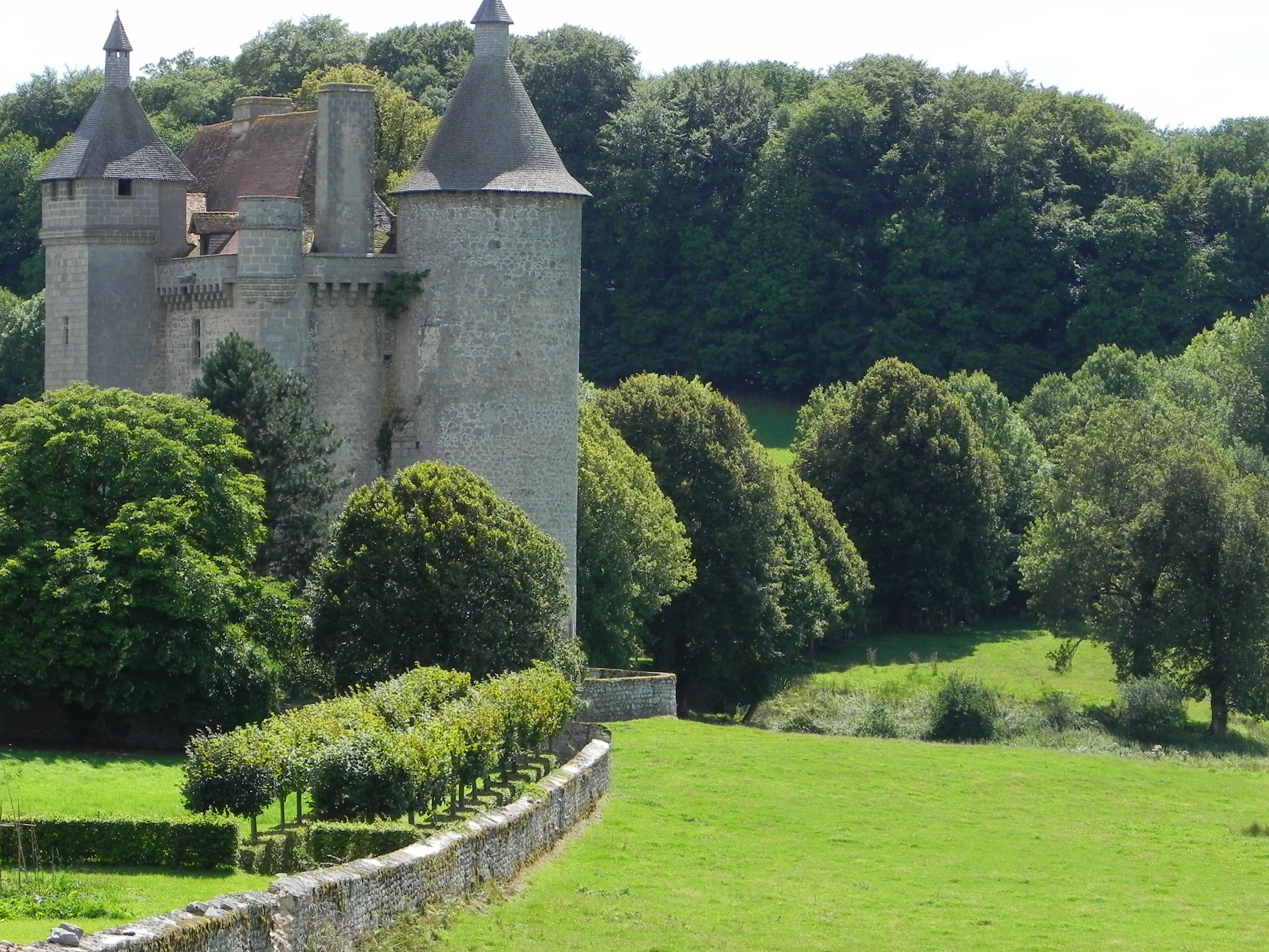 Château de Villemonteix, Saint-Pardoux-les-Cards, Creuse, Limousin, France